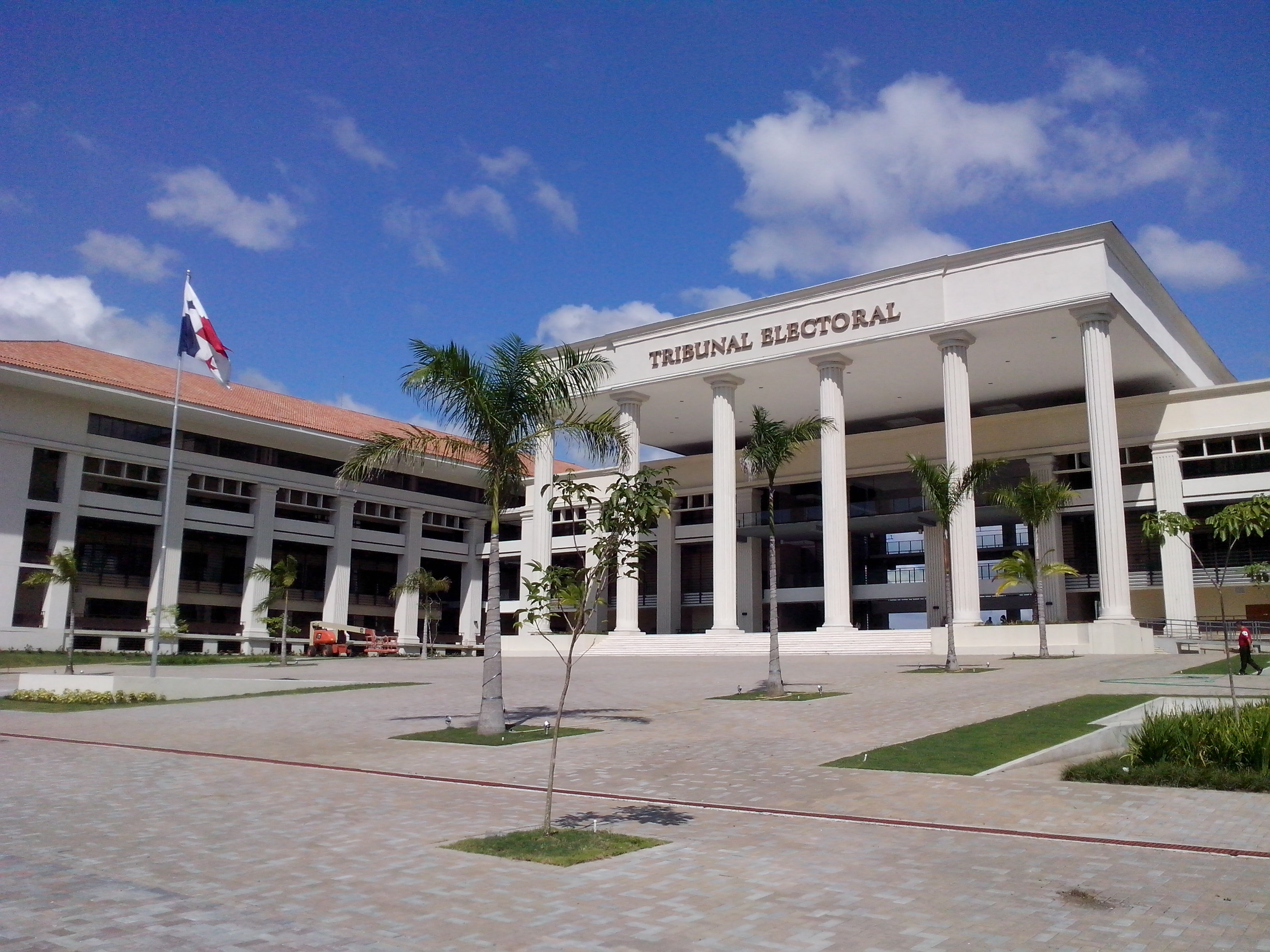 Albrook, Panama City, Panama